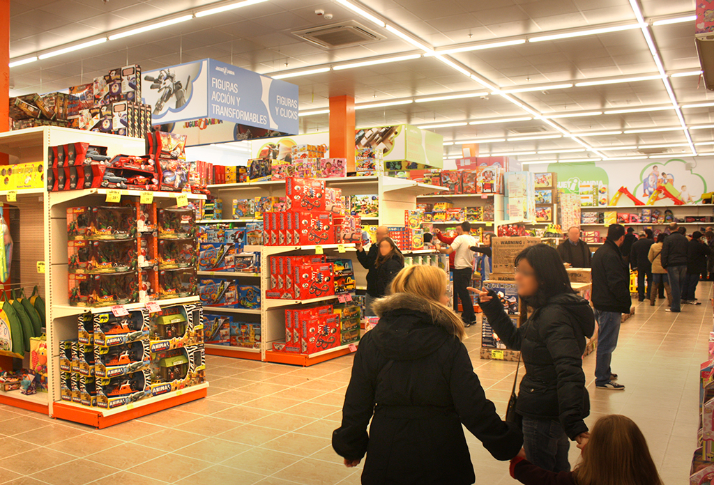 Interior Tienda Albacete 2